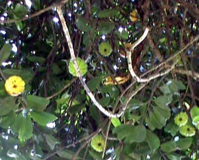 Buah Asam Gelugur Bergelantungan